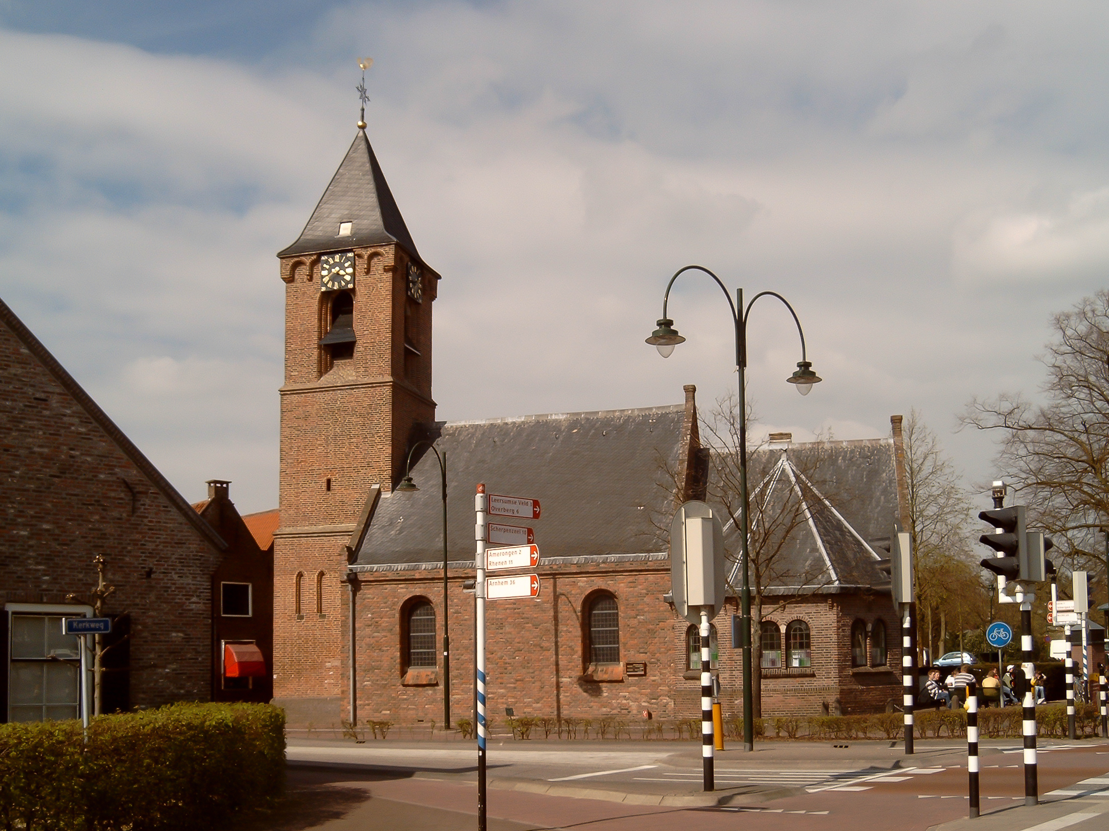 Leersum, kerk